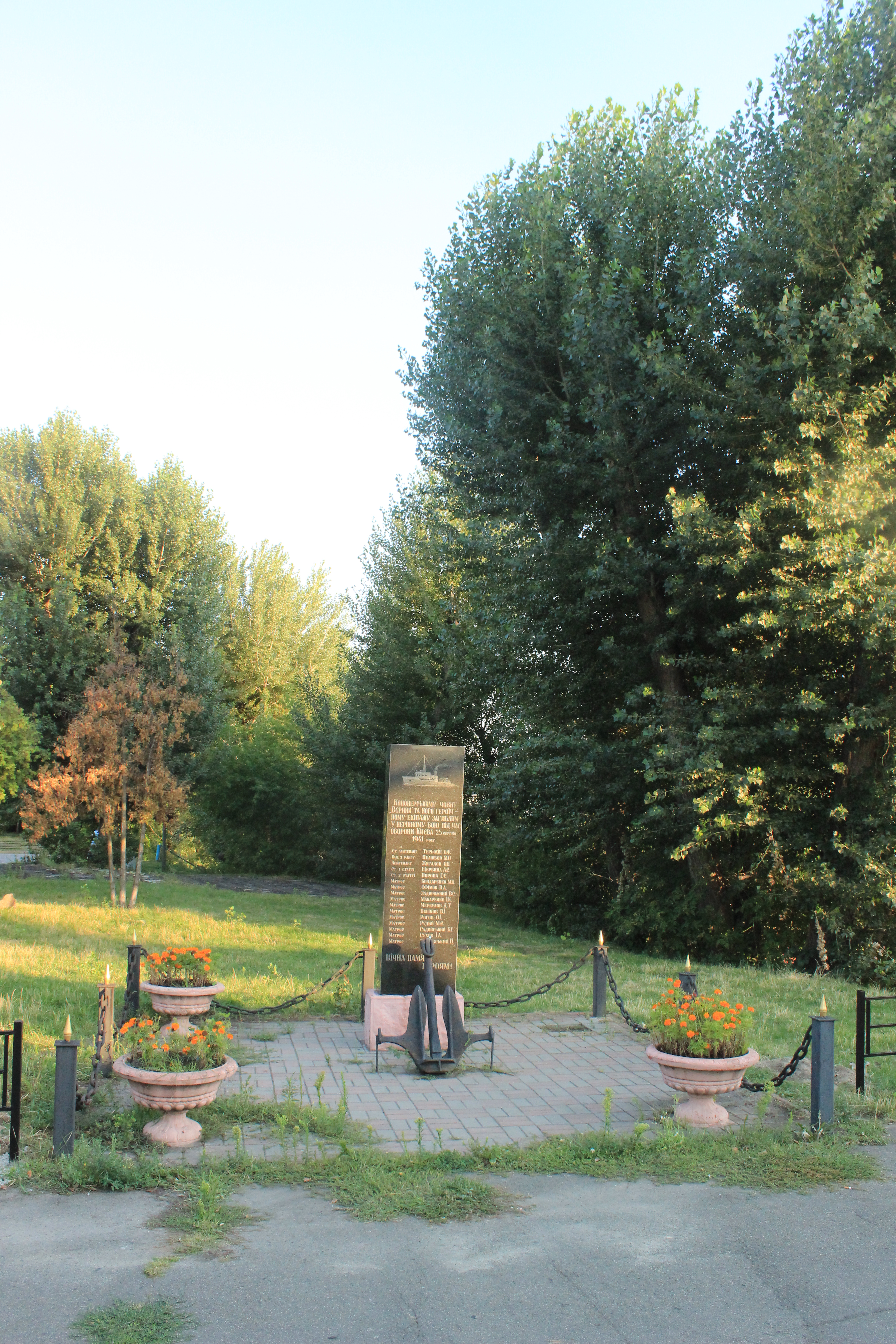 Історико-меморіальний комплекс «Парк Моряків» на Рибальському півострові у м.Києві, Київ, вул. Електриків, 26